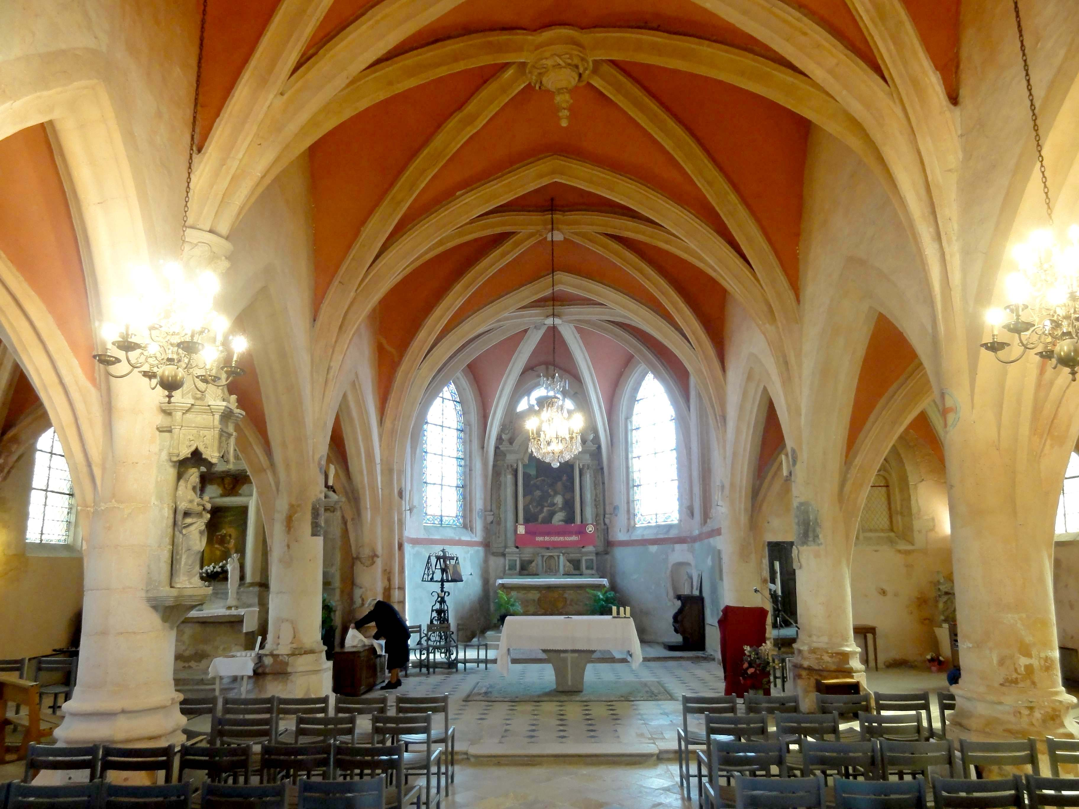 Intérieur de l'église - voir titre.